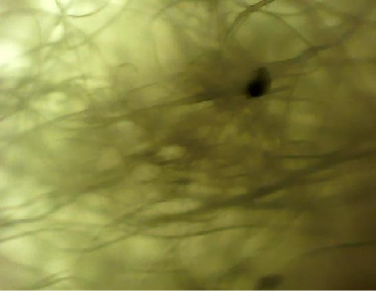 Es un trapo de ballerina con zoom